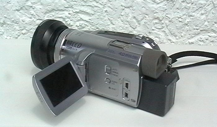 MiniDVKameraPanasonicNV-GS500MitWeitwinkel